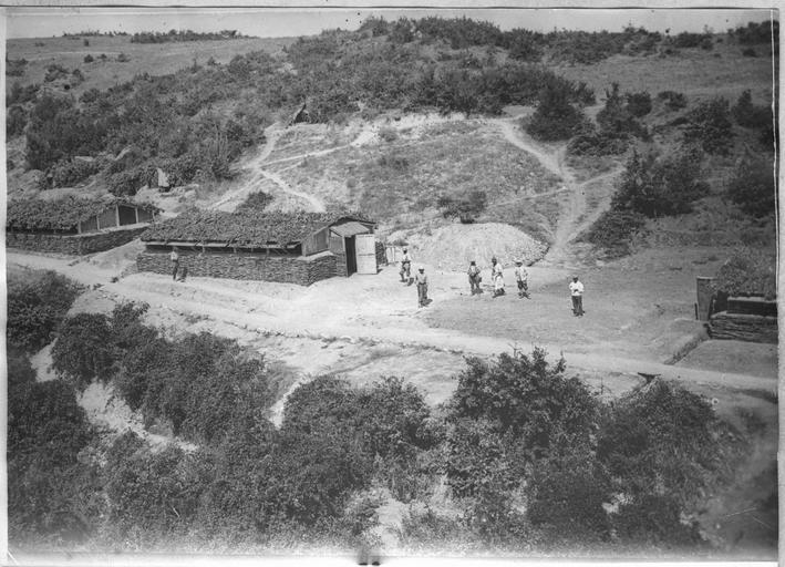 photographie de J. Godart en Grèce.